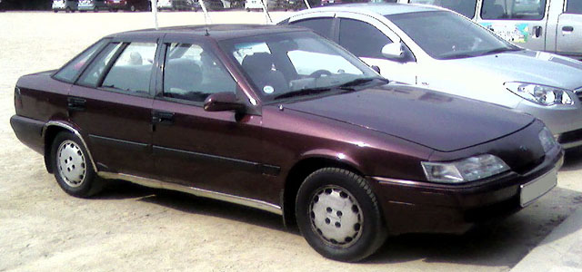 1991년식 대우 에스페로 전측면